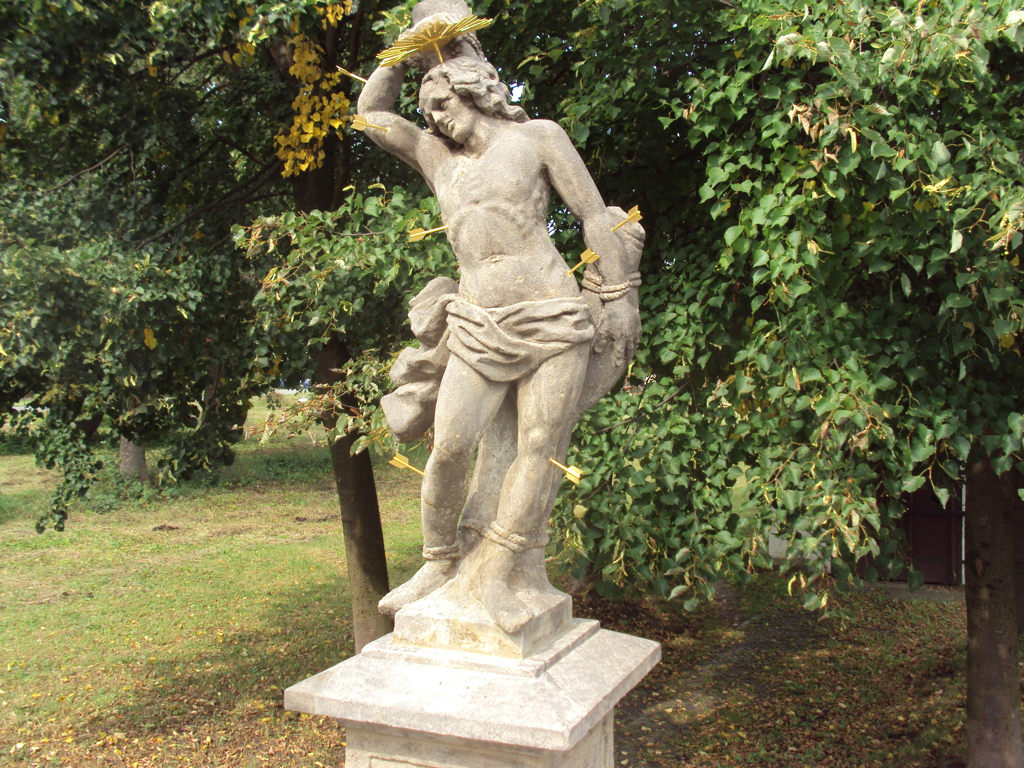 Socha svatého Šebestiána v Mostecké, Zákupy